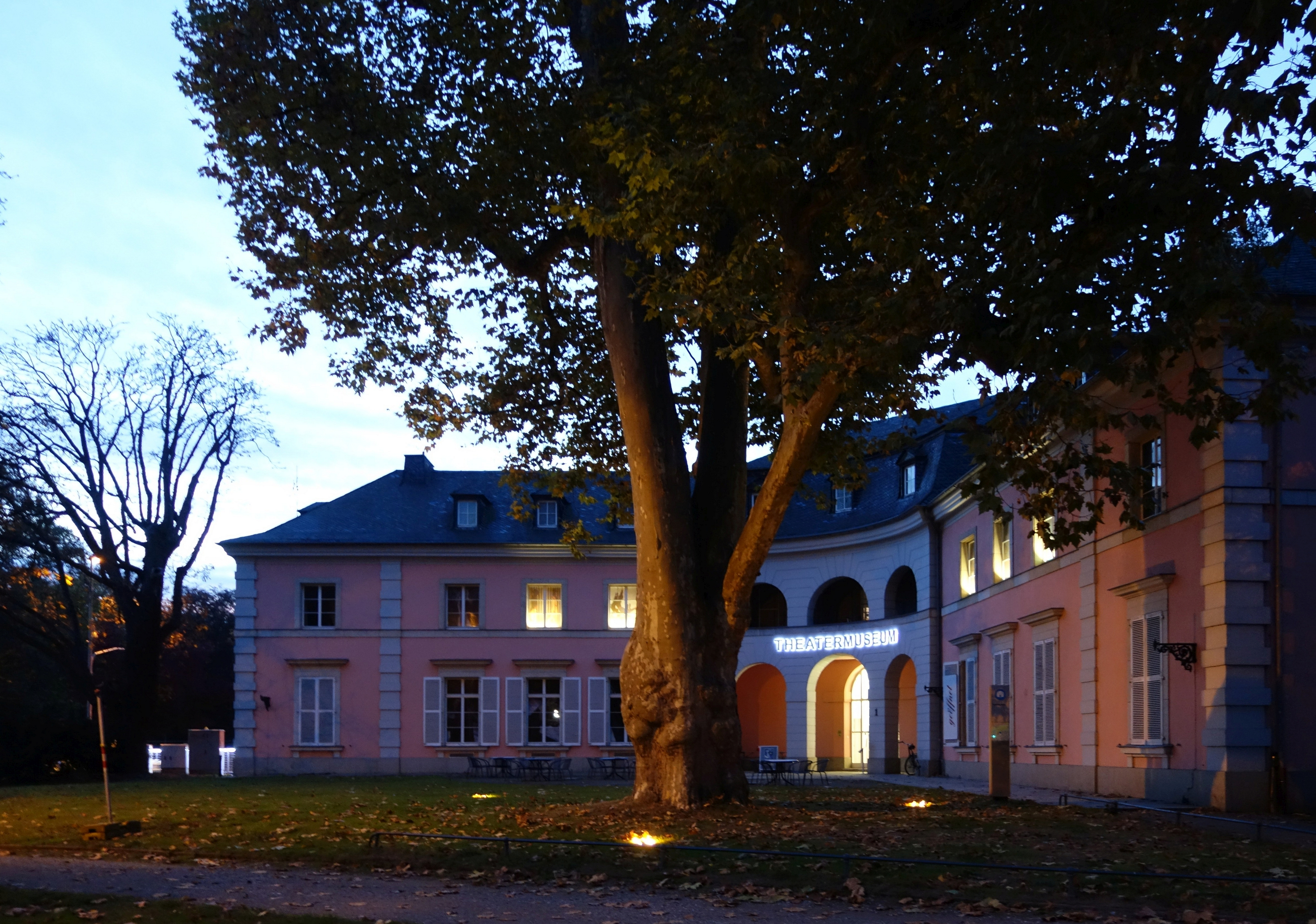 Theatermuseum im Hofgärtnerhaus im Hofgarten Düsseldorf, Nordrhein-Westfalen.